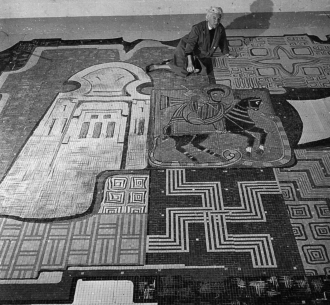 Foto opera pubblica a mosaico di Nenne Sanguineti Poggi. Asmara (Eritrea).